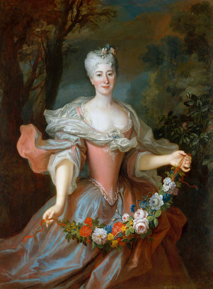 Беларуская (тарашкевіца): Партрэт Марцыбэлы Завішы (Marcybeła Zaviša) з князёў Агінскіх (Aginski)